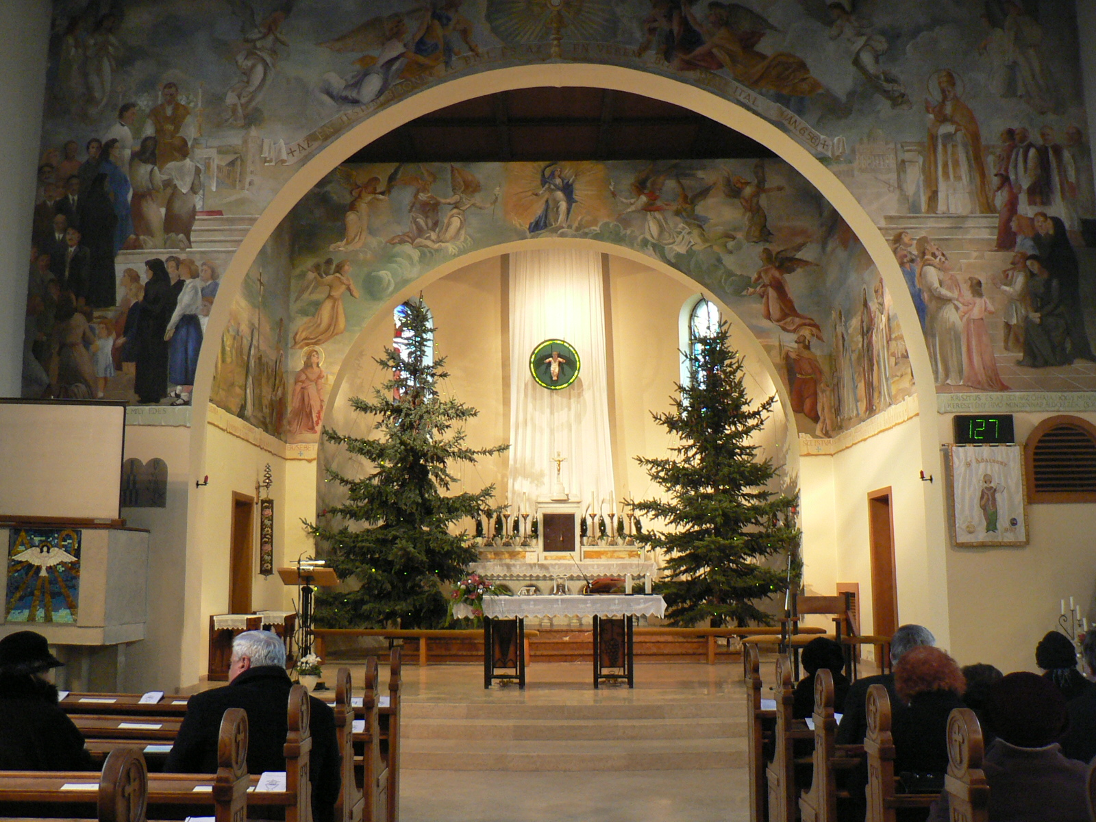 Karácsonyi templombelső a dunabogdányi katolikus templomban